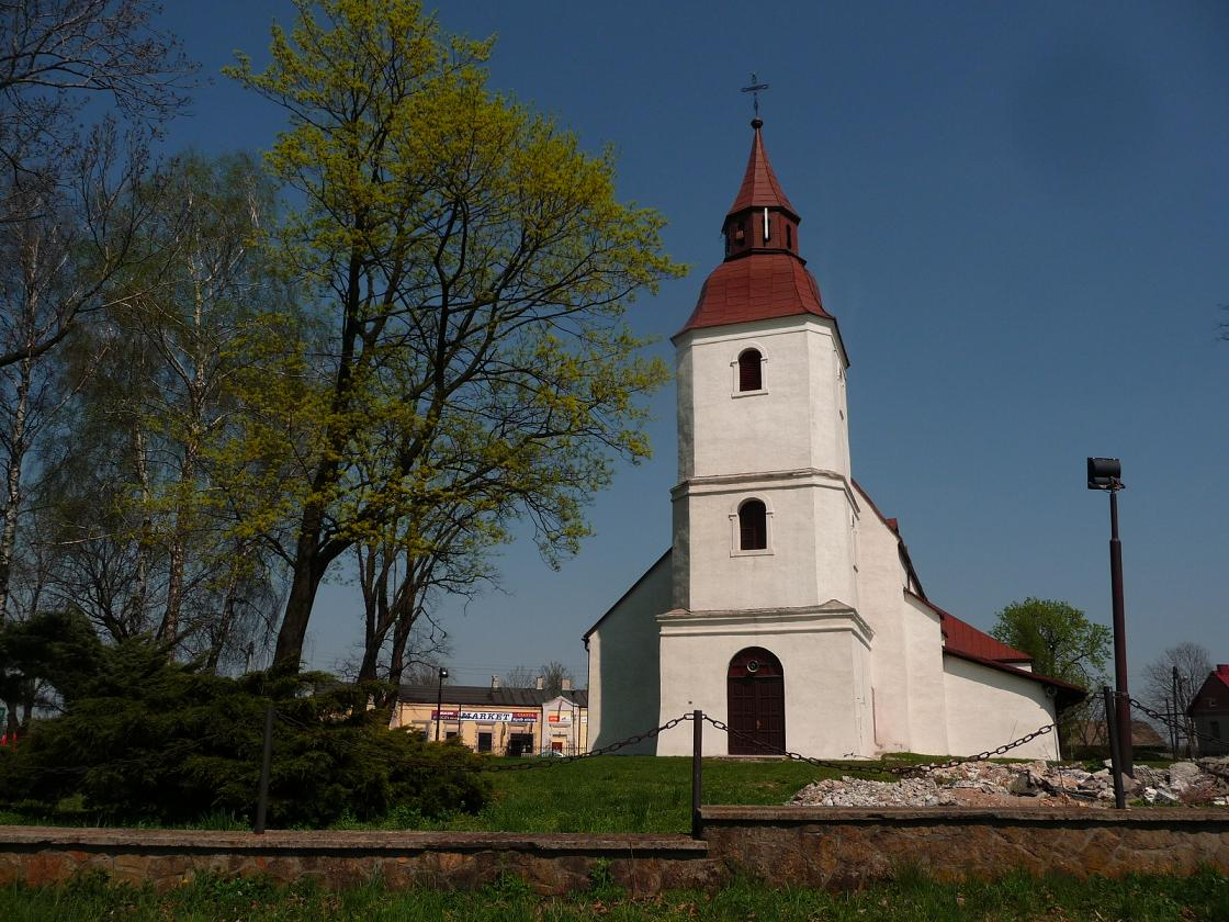 Wojkowice Kościelne, kościół par. p.w. śś. Marcina i Doroty, 1 poł. XIII, XV, XVIII